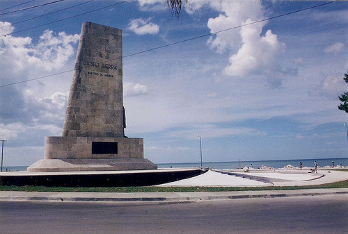 Monumento al Maestro de las Américas Don Justo Sierra Méndez